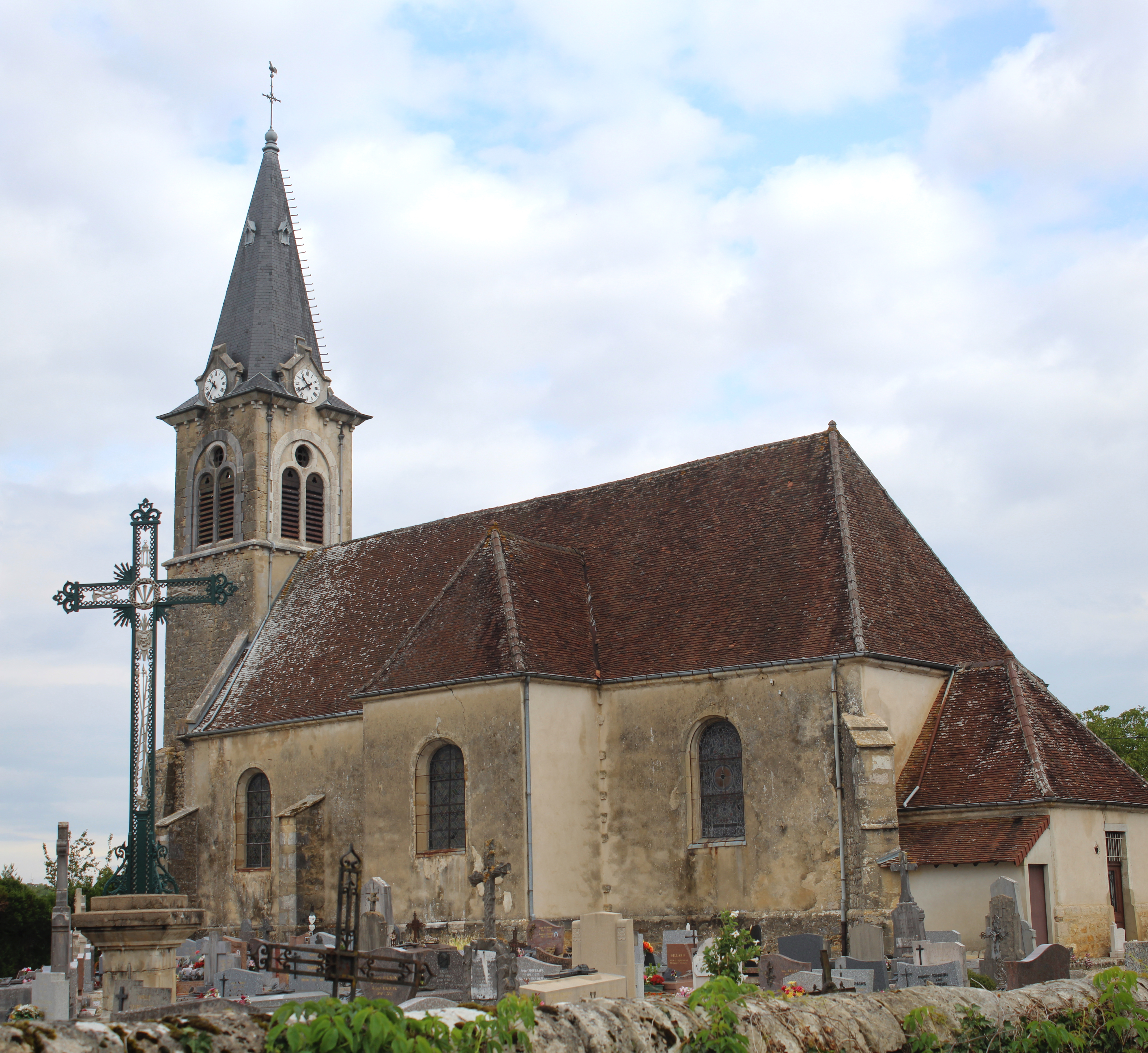 Église Saint-Pierre de Vers-sous-Sellières.